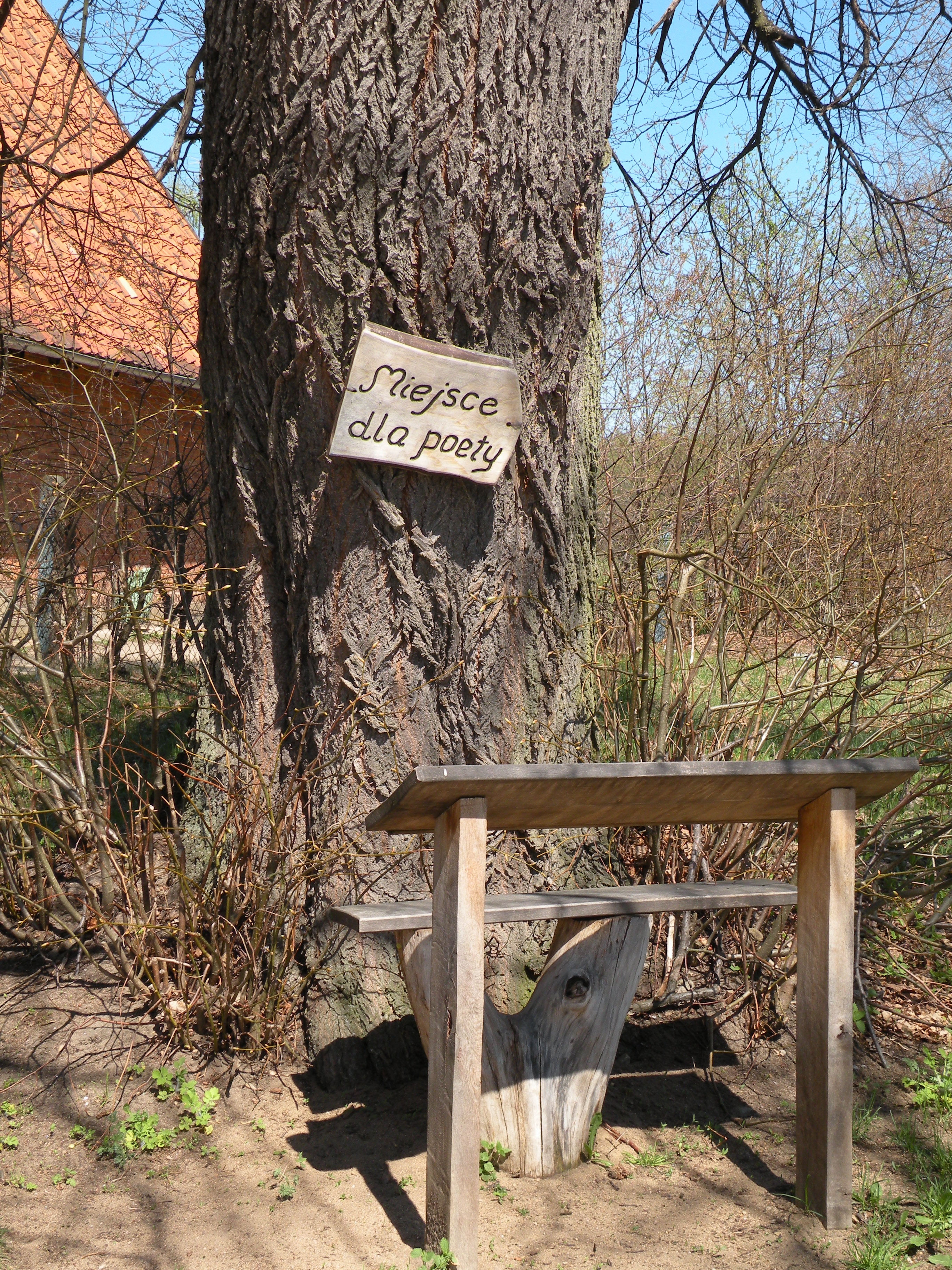 Nowa Kaletka, stolik dla poety